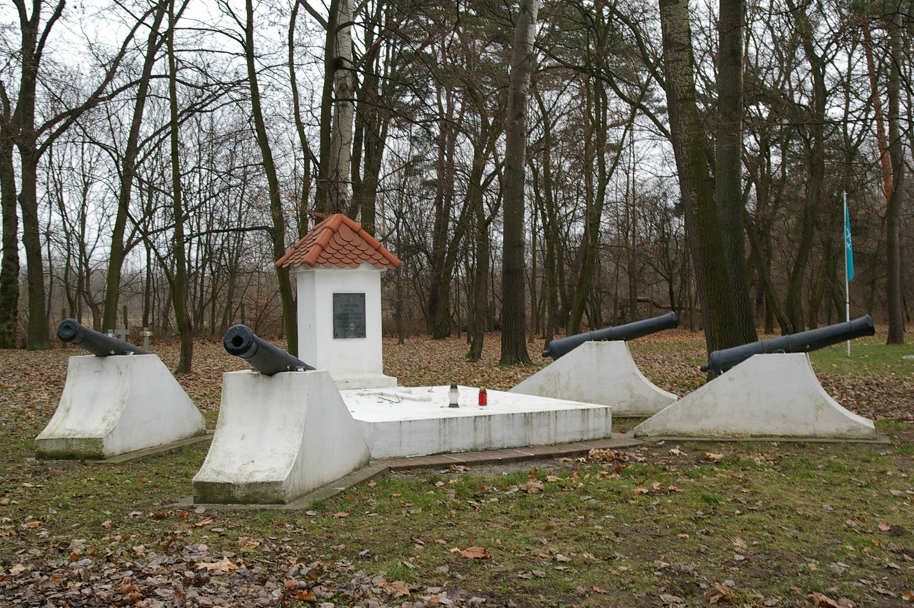 Nowy Dwór Mazowiecki, cmentarz garnizonowy twierdzy Modlin, 1817-1945